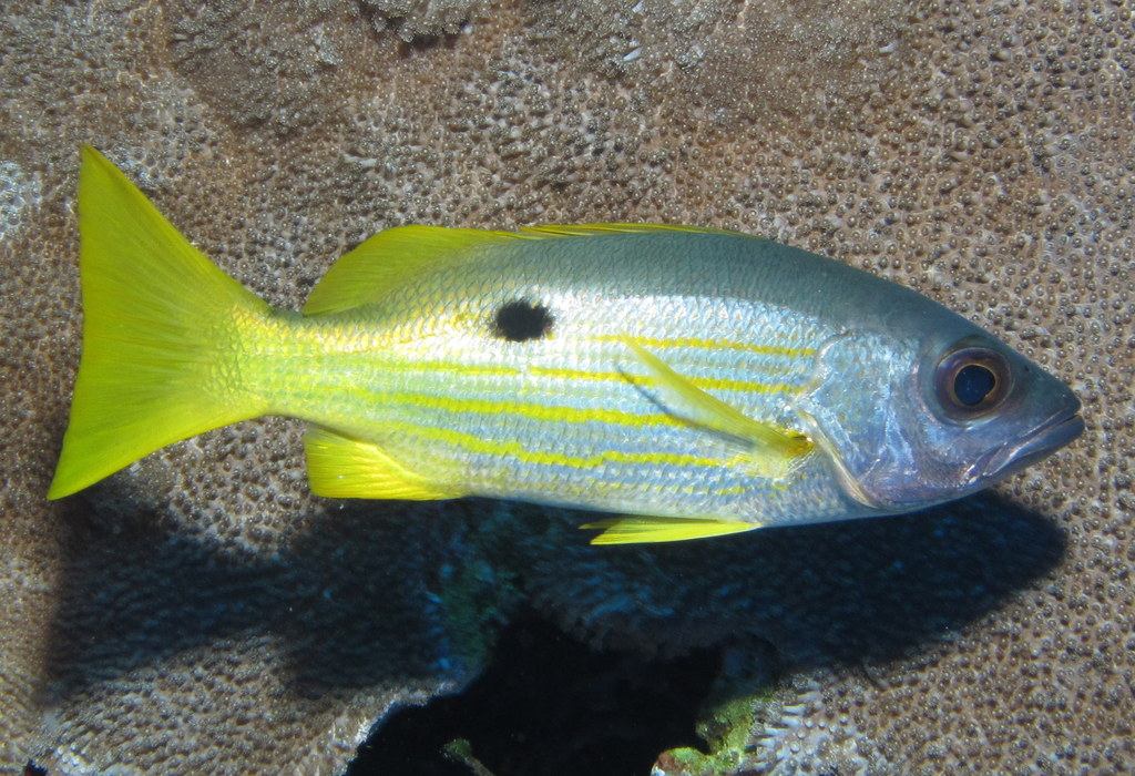 Ehrenberg's Snapper, Lutjanus ehrenbergi at Gota Kebir, St John's reefs, Red Sea, Egypt #SCUBA